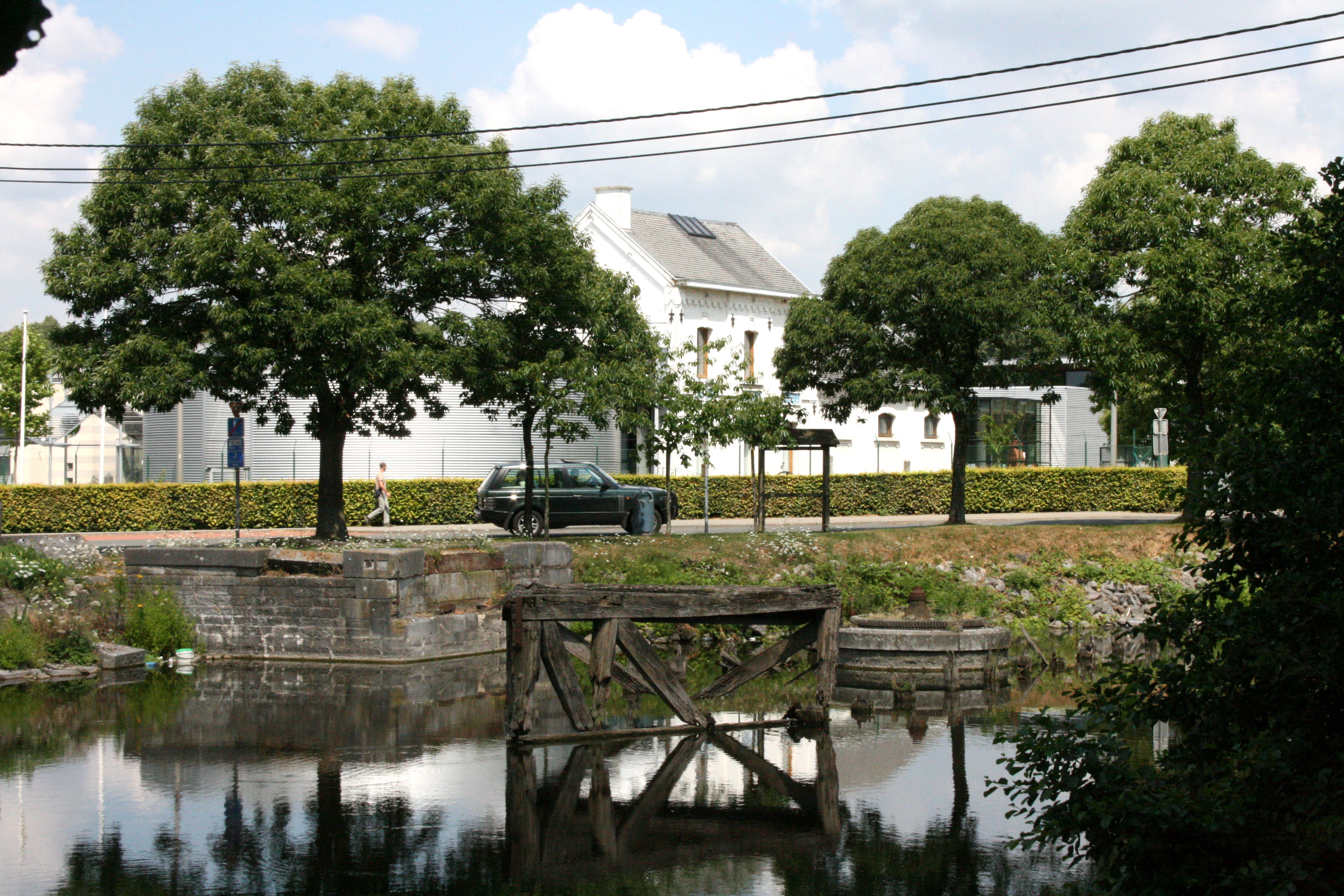 Seneffe (Hainaut), Belgique. Vue de l'ancien canal Charleroi-Bruxelles et Centre de l'Eau en arrière-plan